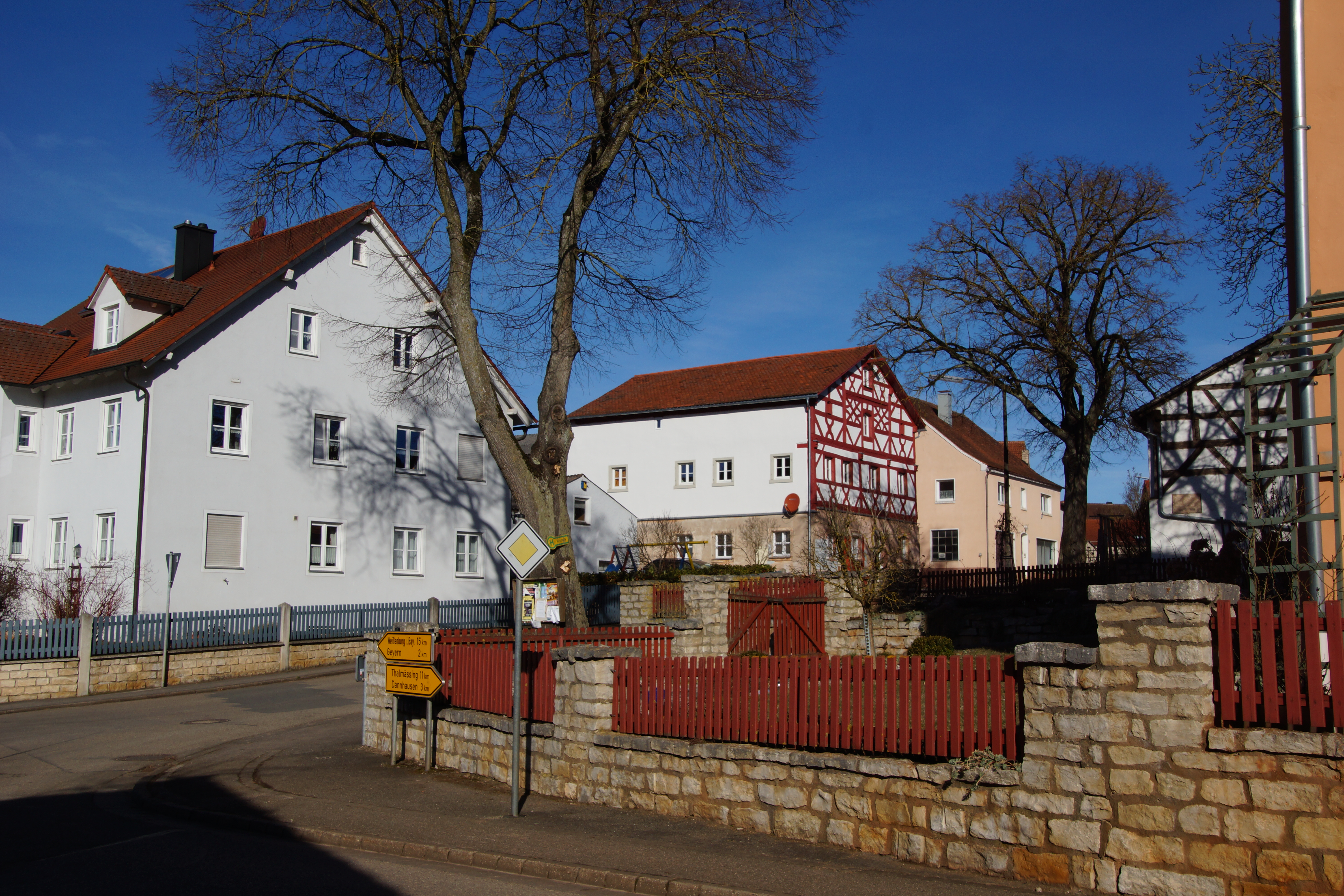 Bergen bei Weißenburg